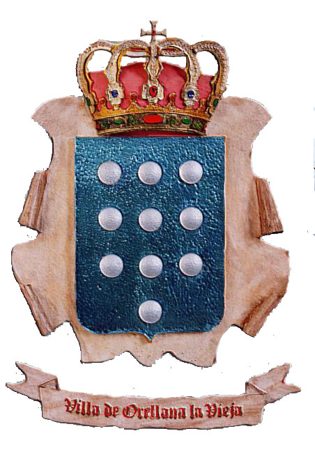 Escudo de Orellana la Vieja (Badajoz, España)